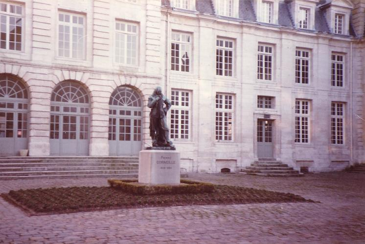 La cour principale du lycée Corneille de Rouen en 1987